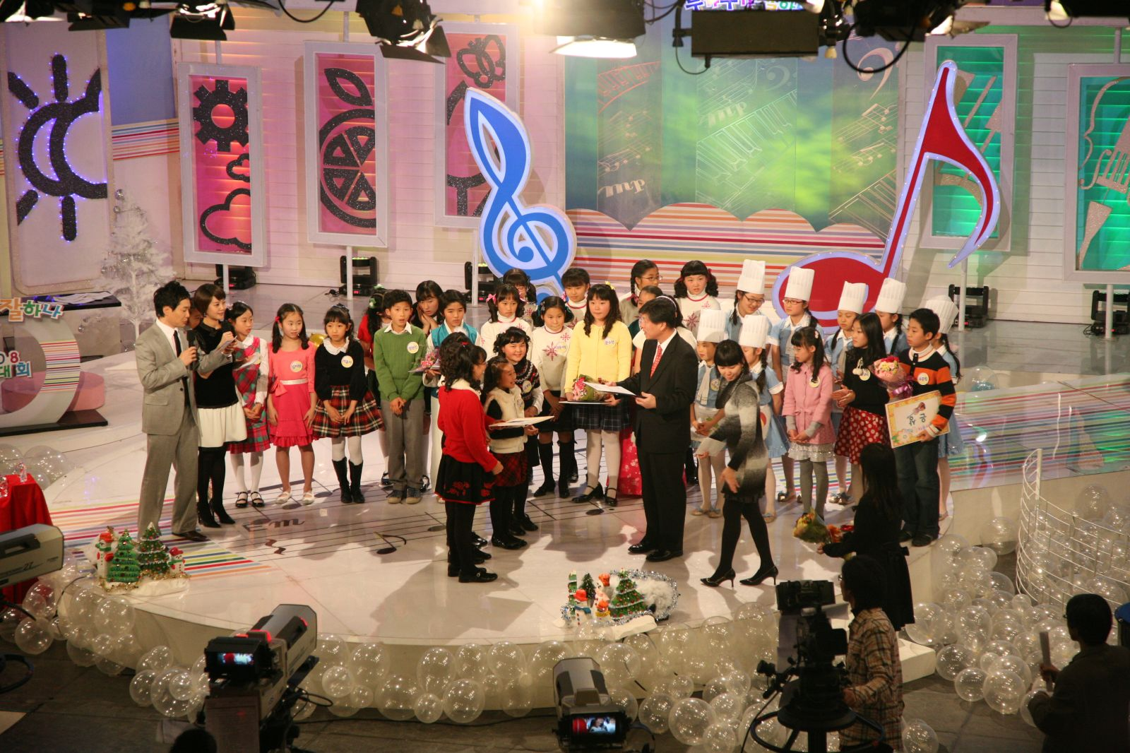 KBS 누가누가 잘하나 2008 연말대회